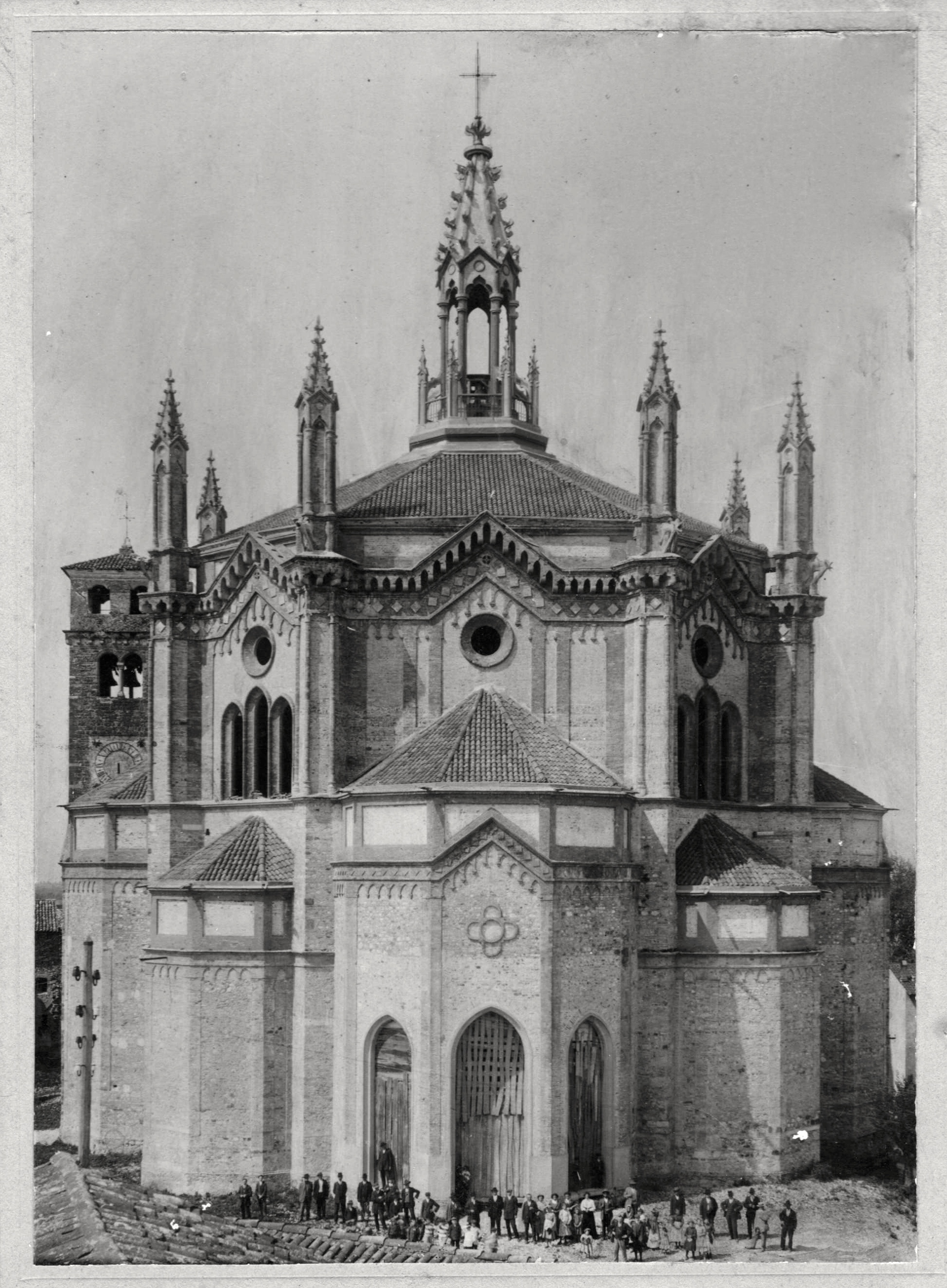 Riproduzione di foto anteriore al 1913.